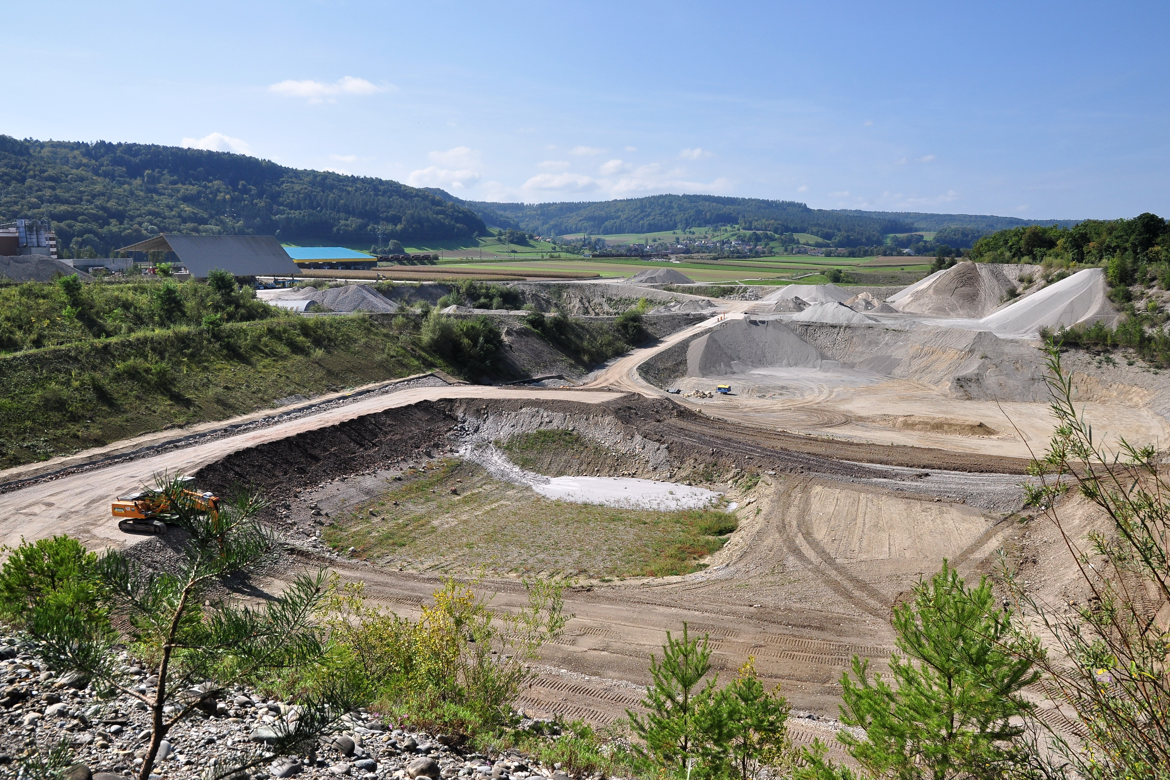 Weiacher Kies AG in Weiach (Switzerland)